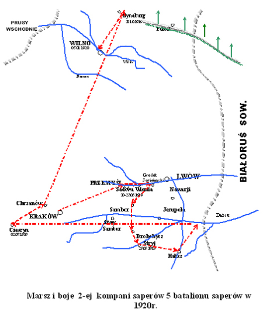 Boje i marsze 2 ksap z 5 Pułku Saperów w 1920r.